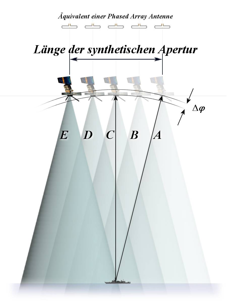 Die Entfernung zum Ziel unterscheidet sich zwischen den Positionen der Plattform. Wenn sich das Ziel auf der Mittelachse der realen Apertur befindet ist die Entfernung geringer als wenn die reale Antenne zum Ziel hin schielen muss. Das drückt sich in einem Phasenunterschied Δφ aus. Für ein scharfes Bild muss der Phasenunterschied zwischen der Position C und den anderen Positionen in der Bildbearbeitungssoftware korrigiert werden.